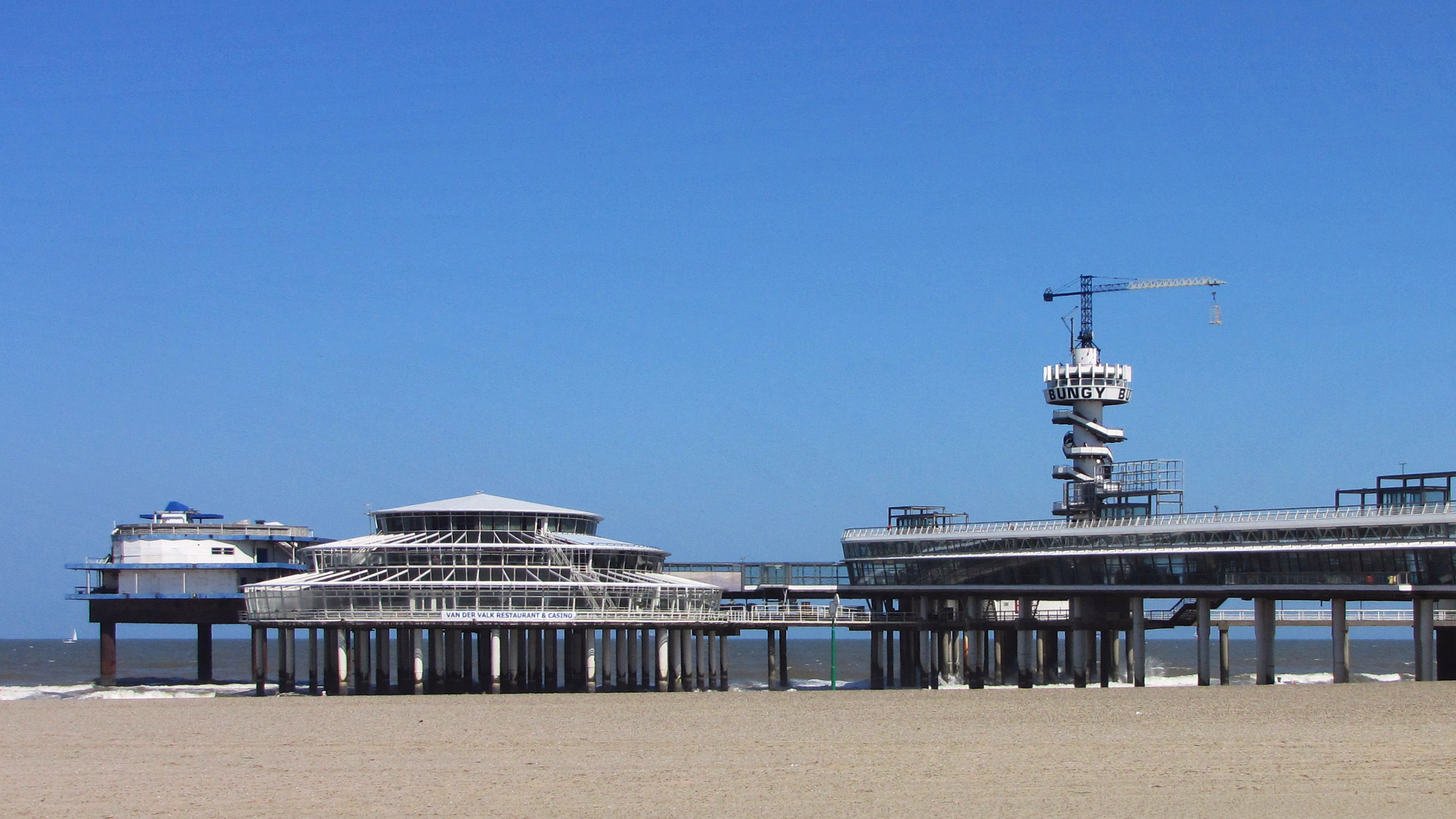 Scheveningse pier - Seebrücke Scheveningen Pier, zurückgehend auf 1901, Neubau 1961, renovation with fire protection 2015, Länge 300m Höhe 45m Sicht 17Km Nordsee Stadtteil von Den Haag Niederlande Foto Wolfgang Pehlemann IMG_1279.jpg